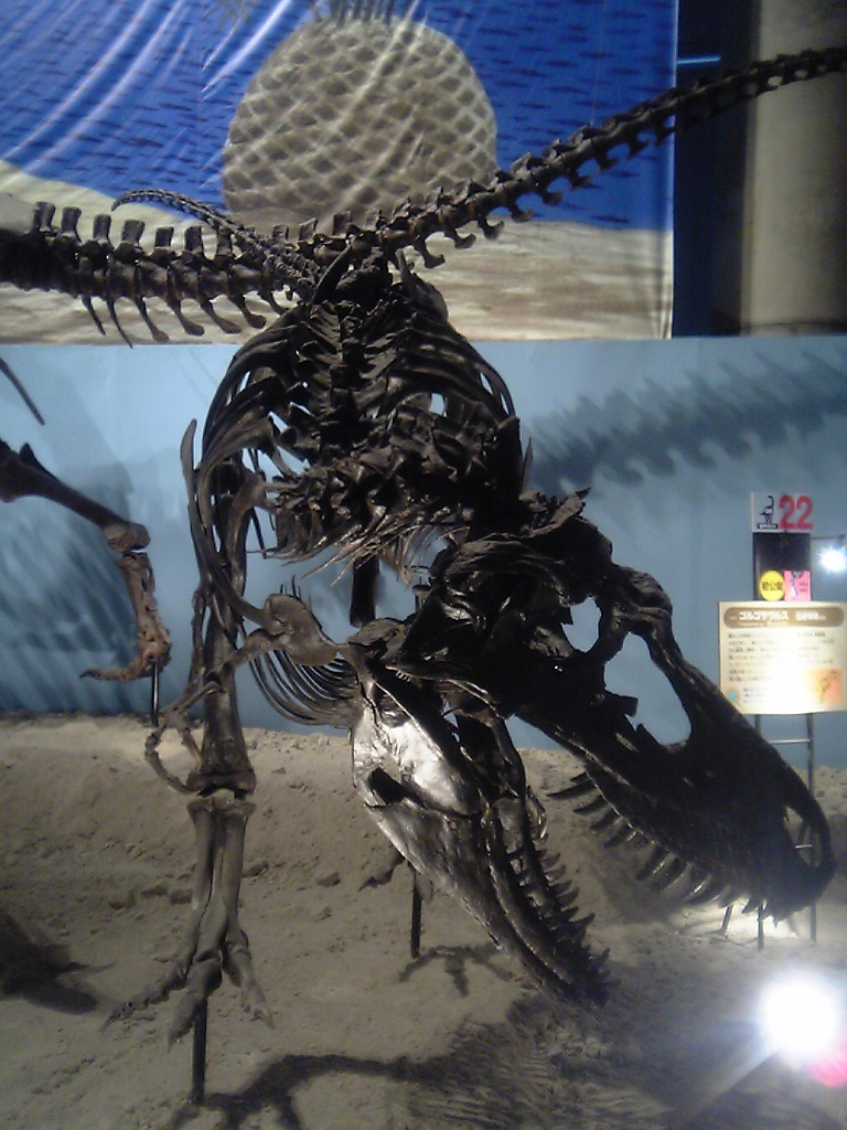 A photo of Gorgosaurus' skelton. Taken at Makuhari,Chiba,Japan.